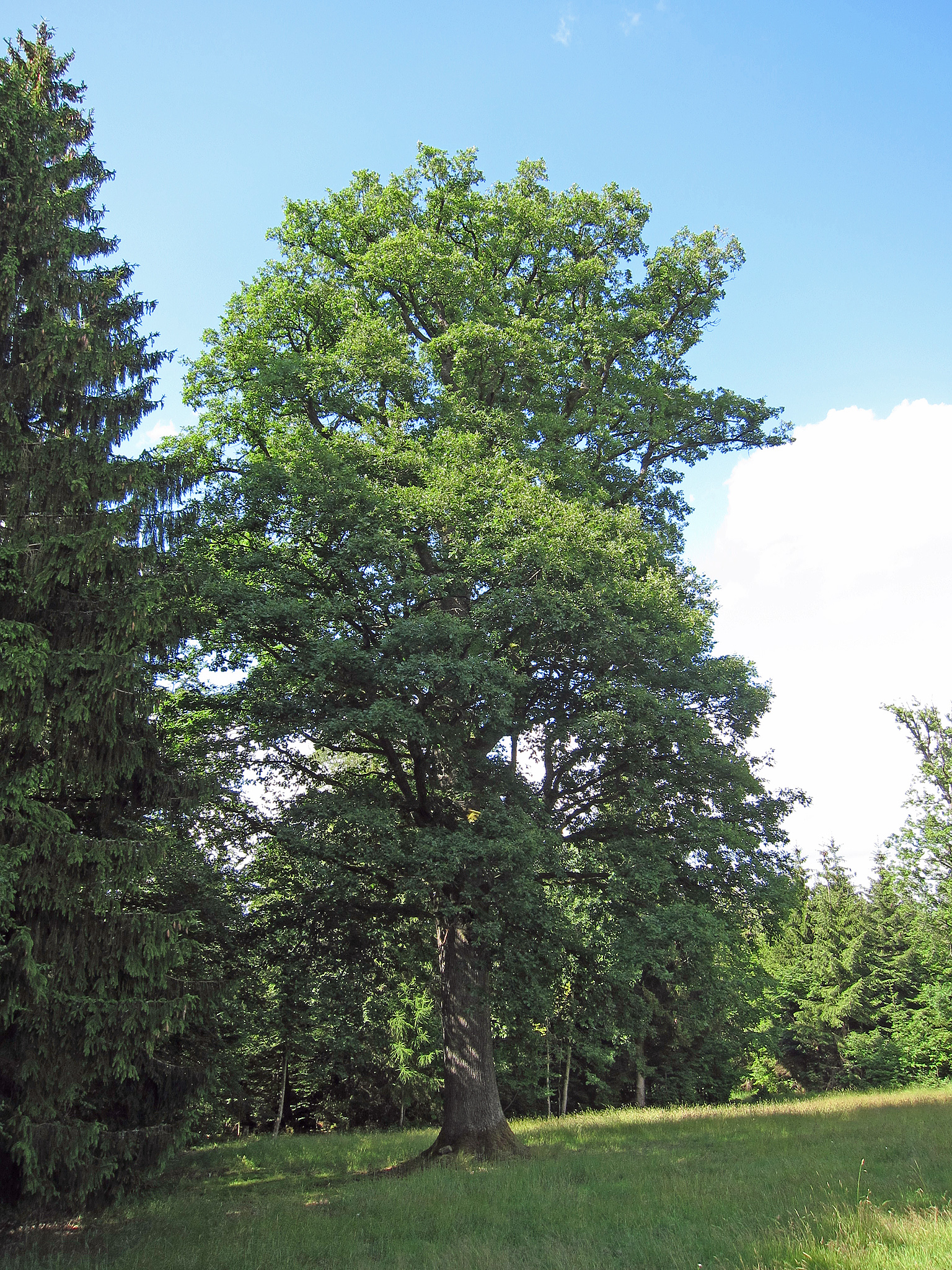 Eiche bei Schönderling